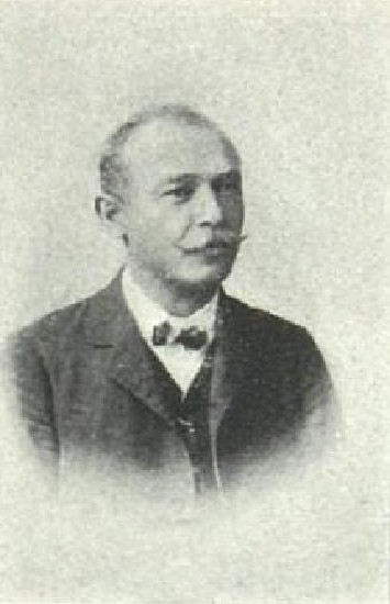 Josef Holanec (1872-1925), rakouský politik